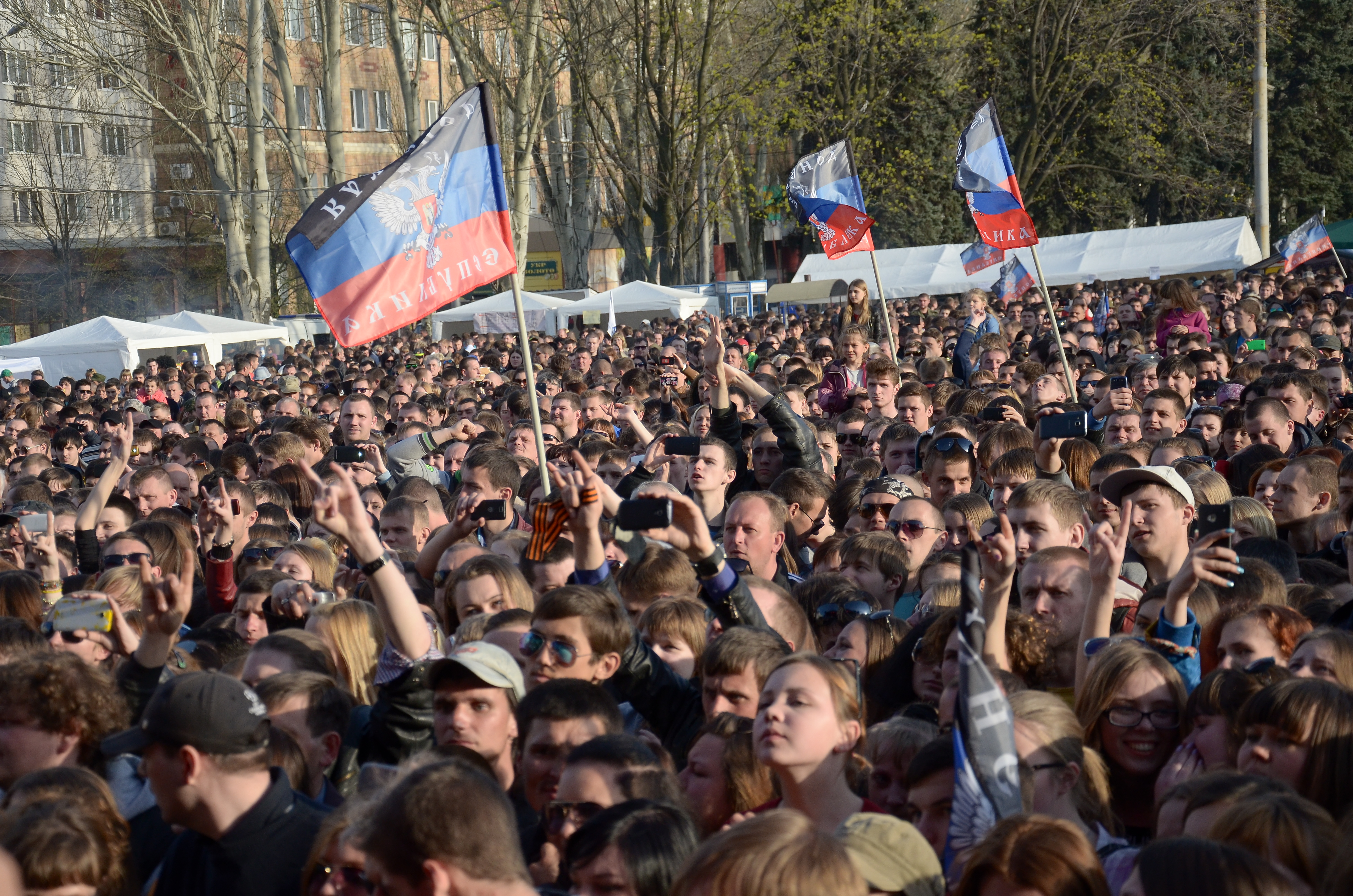 День солидарности молодёжи в Донецке